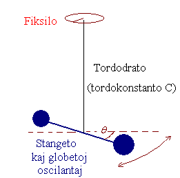 Pendule de torsion (Schéma personnel) Catégorie: schéma_de_physique